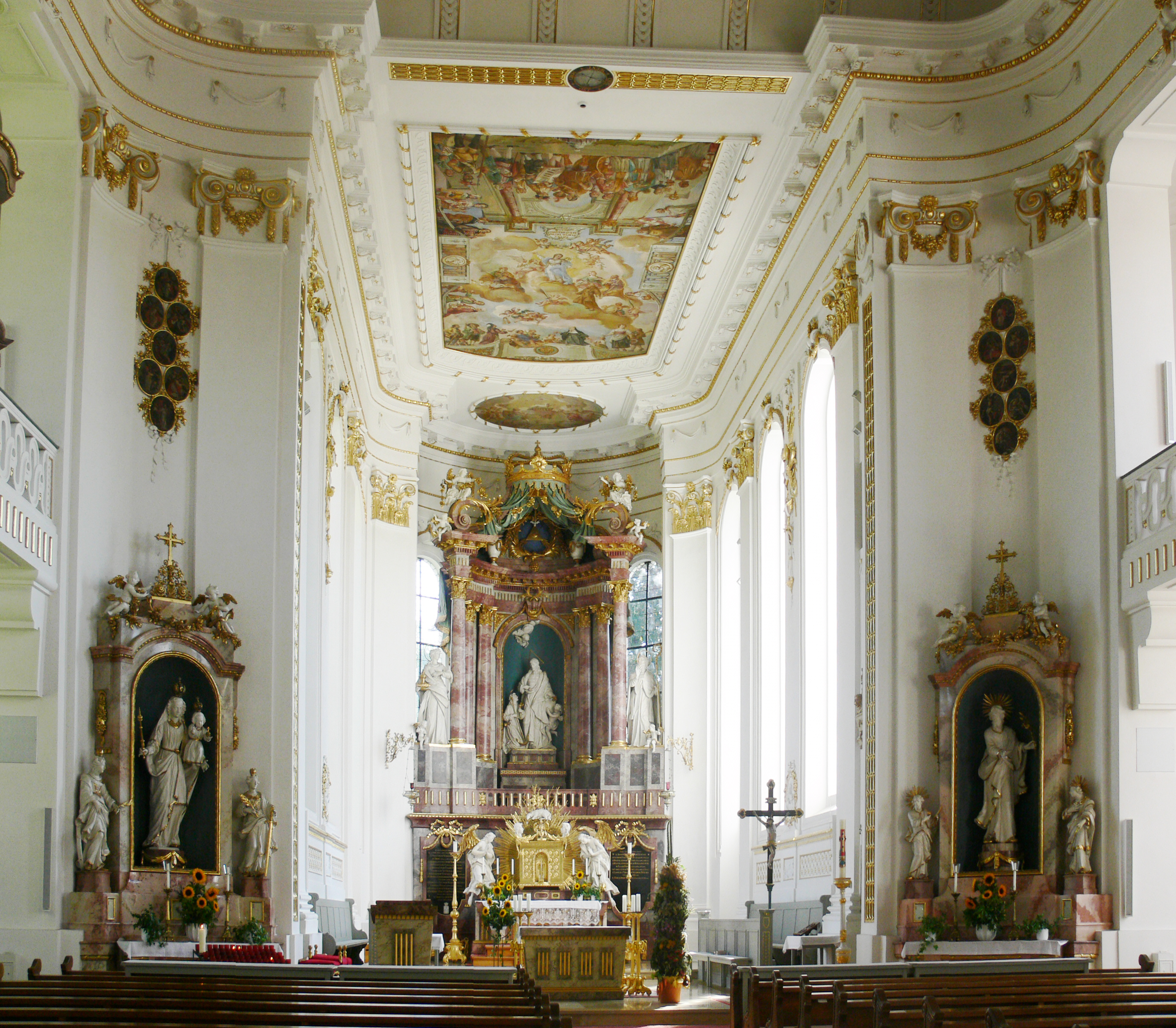 Pfarrkirche St. Verena, Bad Wurzach, Landkreis Ravensburg